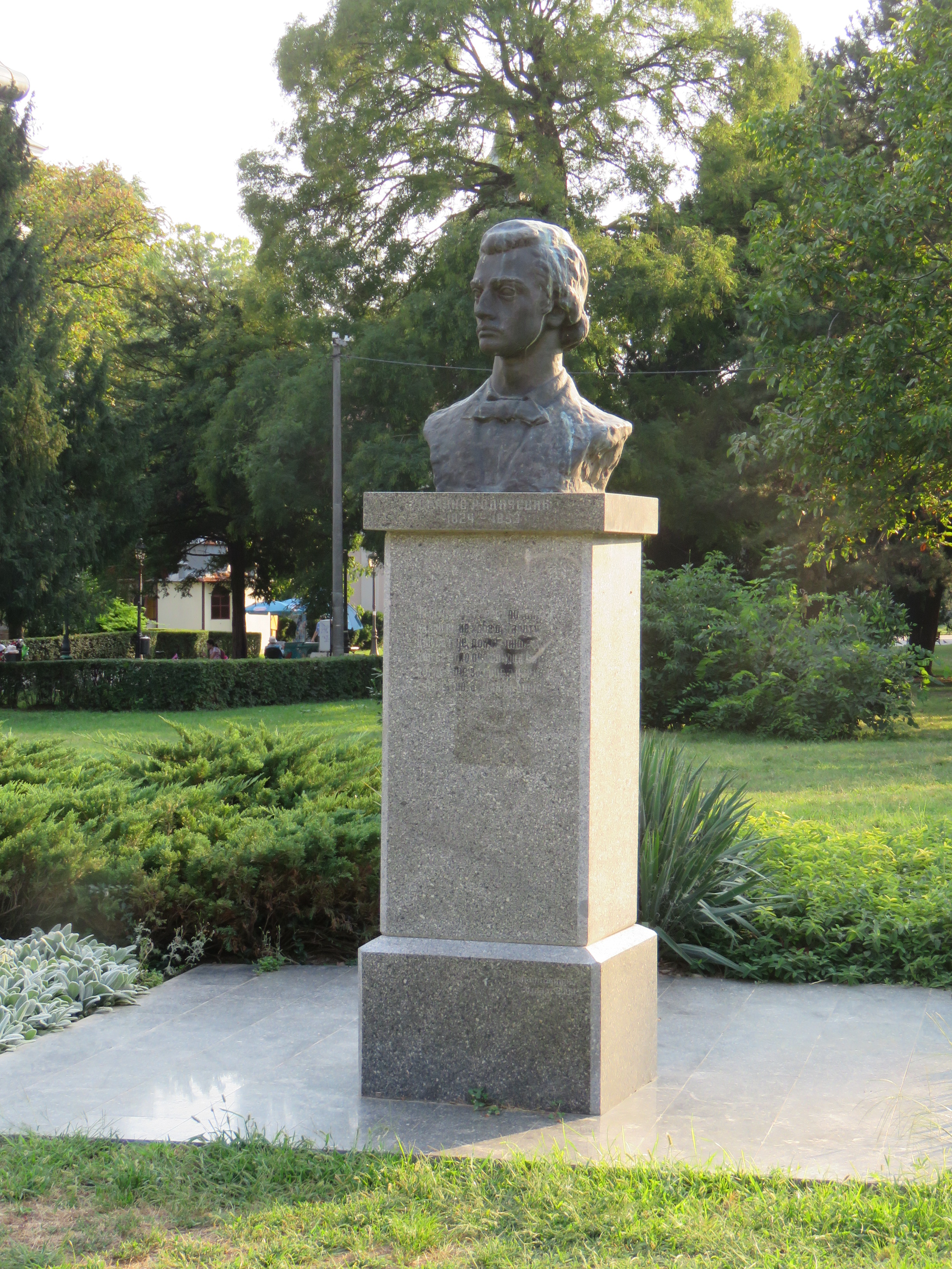 Zemun, spomenik Branku Radičeviću